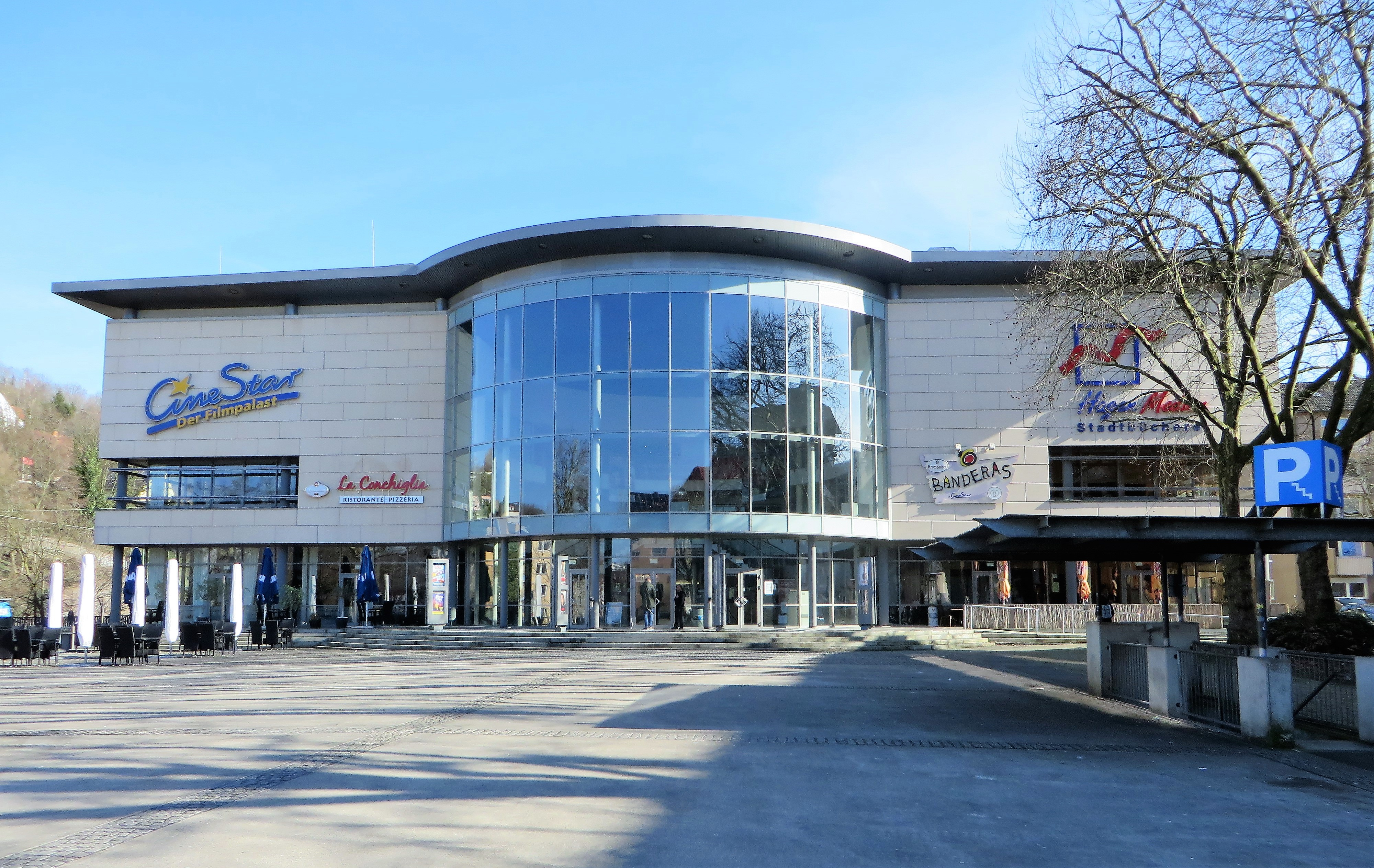 Blick vom Marktplatz Springe in Hagen auf das Medienzentrum, mit CineStar, Hagener Stadtbücherei, Restaurant La Conchiglia und Restaurant Banderas (alle Springe 1). Erbaut 1997/98.